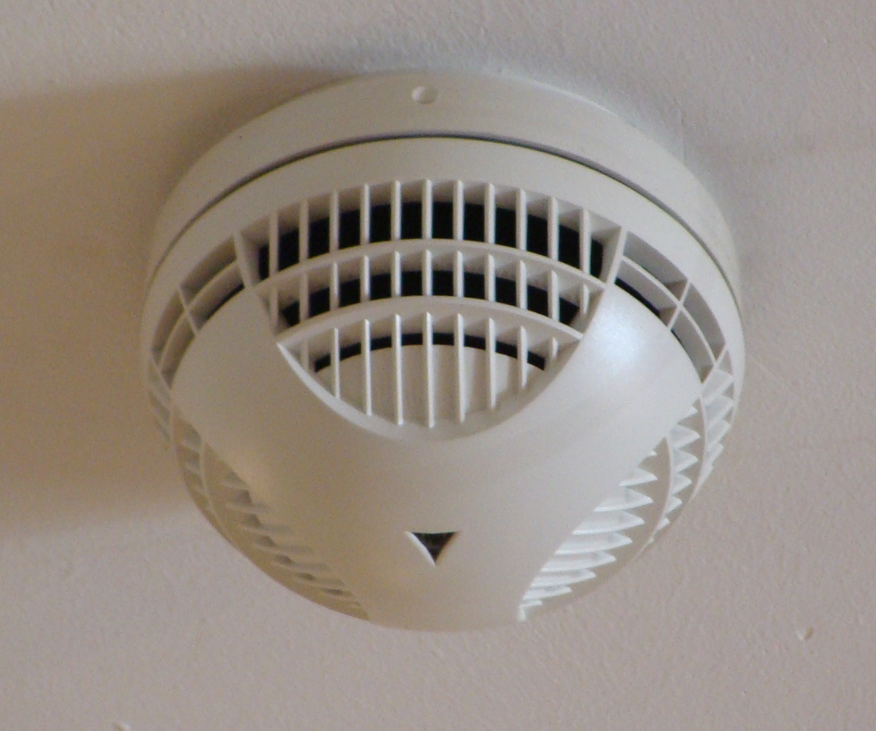 Точечный дымовой пожарный извещатель